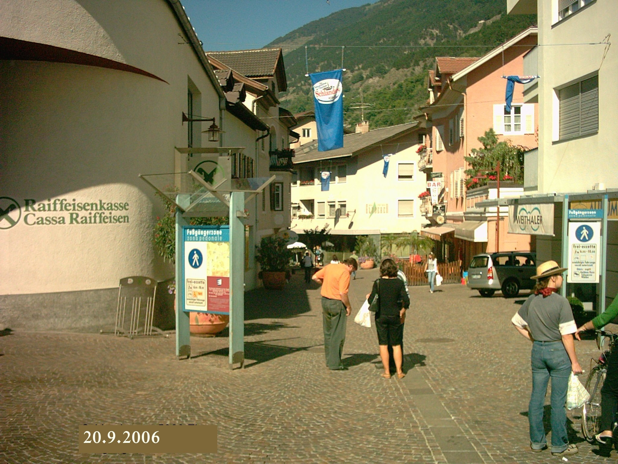 Schlanders